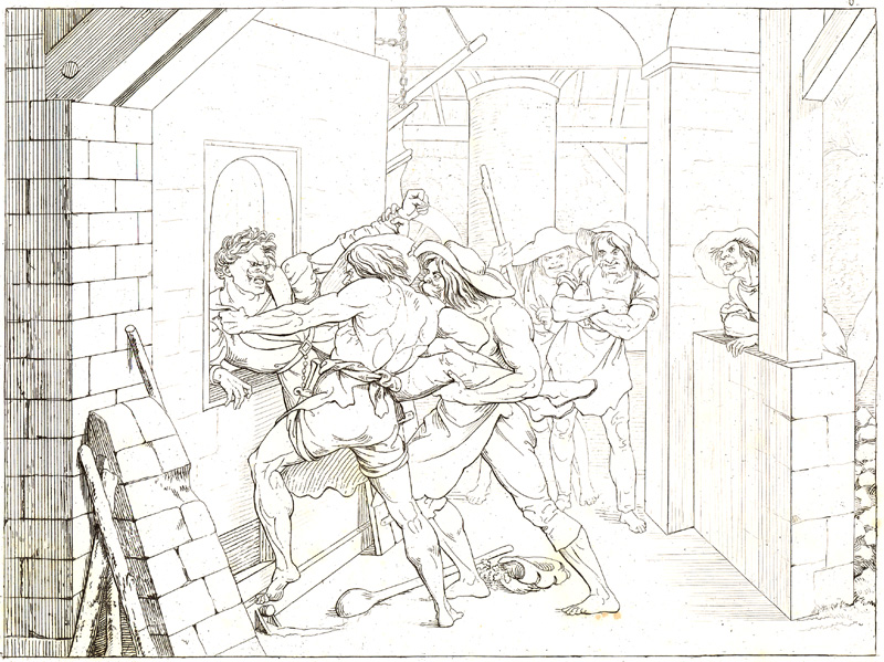 Illustration zur Ballade "Der Gang nach dem Eisenhammer" von Friedrich Schiller. Die Illustration zeigt, wie die Knechte den Jäger Robert statt Fridolin in den Ofen werfen. Der Graf hatte den Jäger geschickt, um den Vollzug seines Todesurteils zu erfahren. Da Fridolin in der Messe als Sakristan und Ministrant diente, verspätete er sich und rettete so sein Leben.